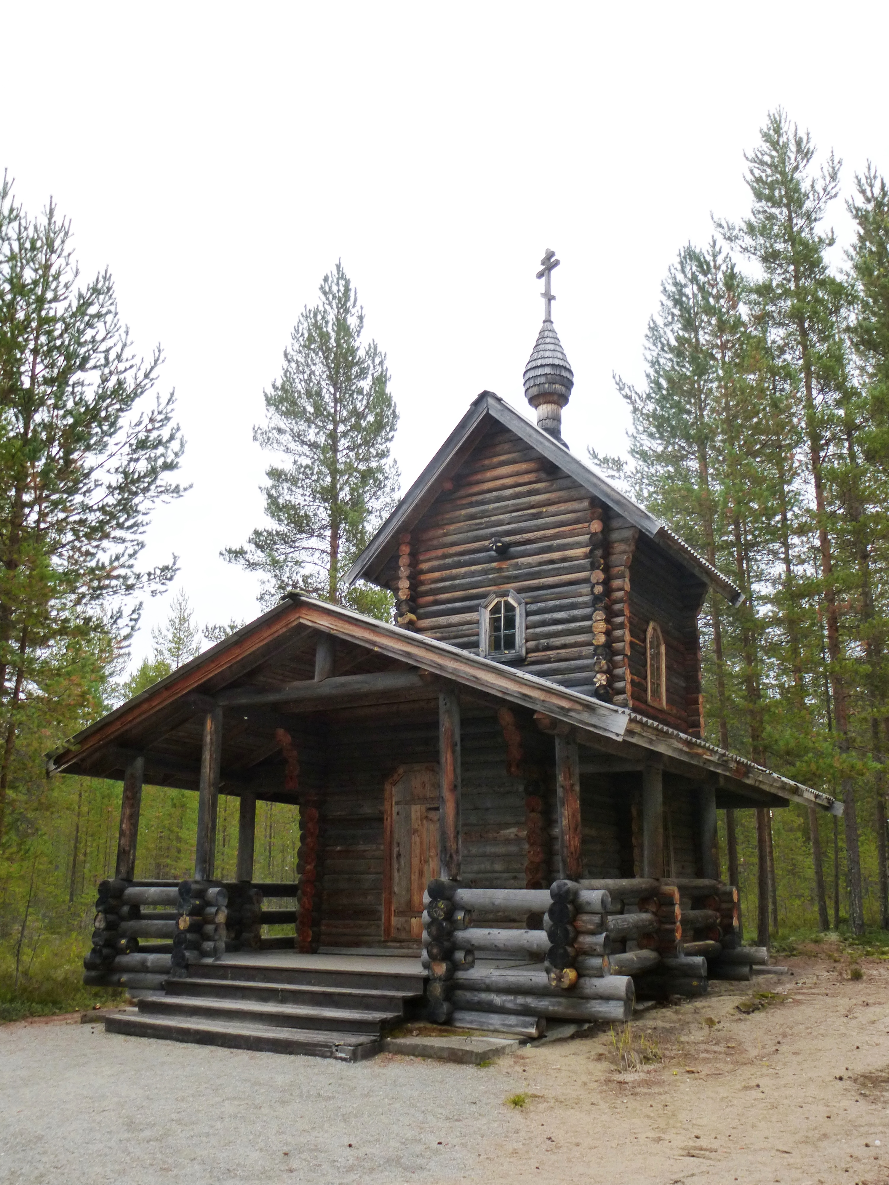 Часовня (арх. Эрнст Воскресенский) Установлена в конце 1990-х годов на месте массовых казней в урочище Сандормох вблизи г. Медвежьегорск, Республика Карелия.